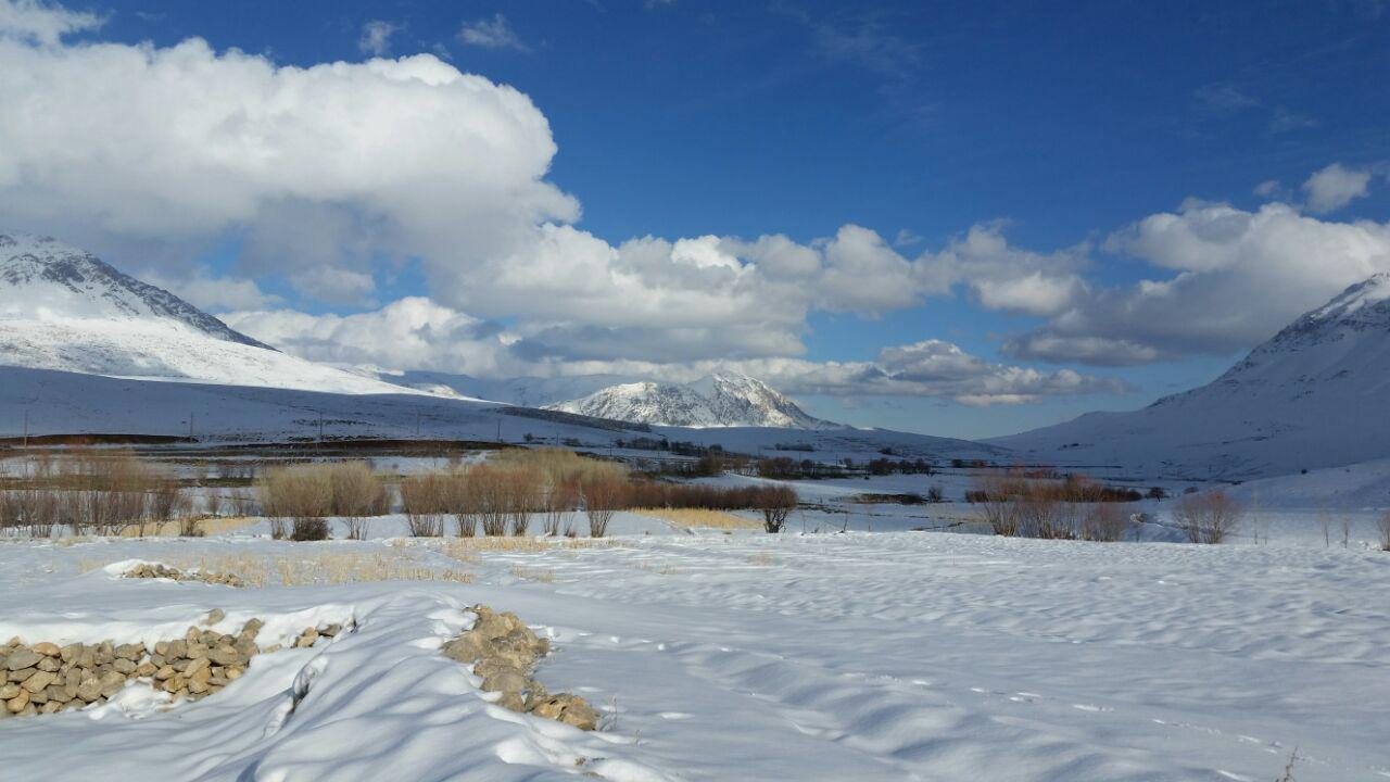 قله ولاش پوشیده از برف عکس از مله تخت بیرانوند شمالی